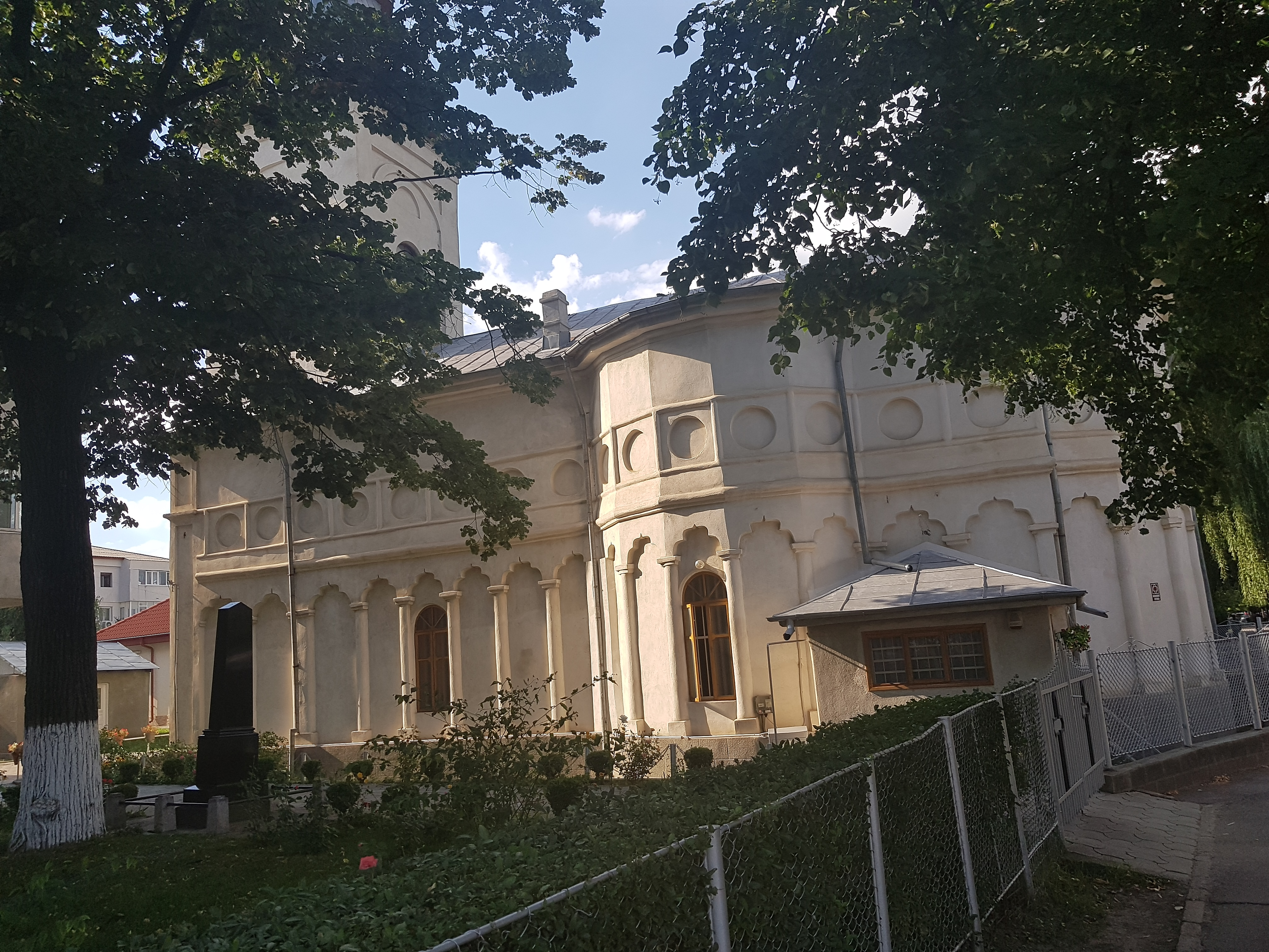 Biserica „Proorocul Samuil” 01